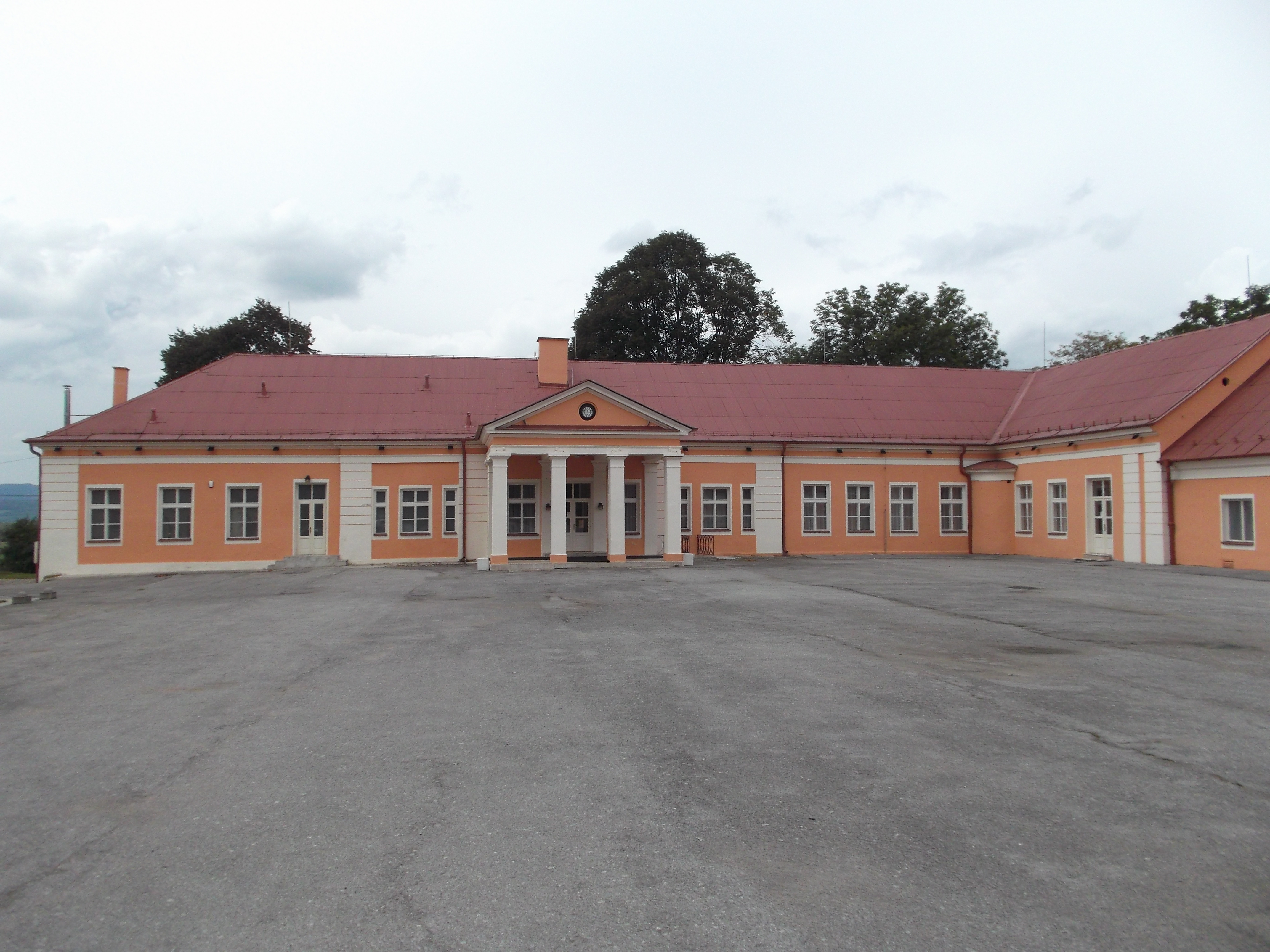 Kaštieľ